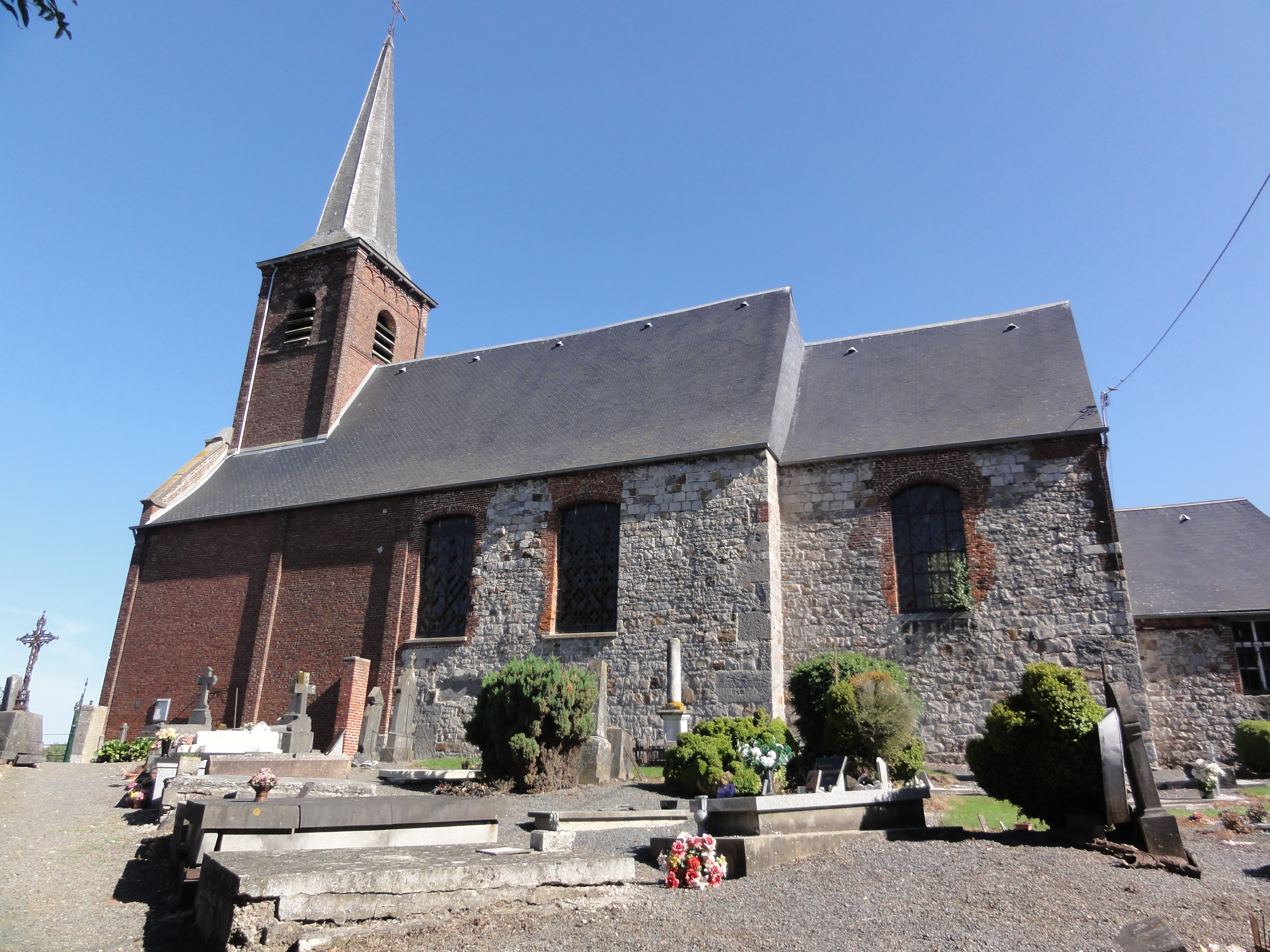 Mecquignies (Nord, Fr) église, vue latérale